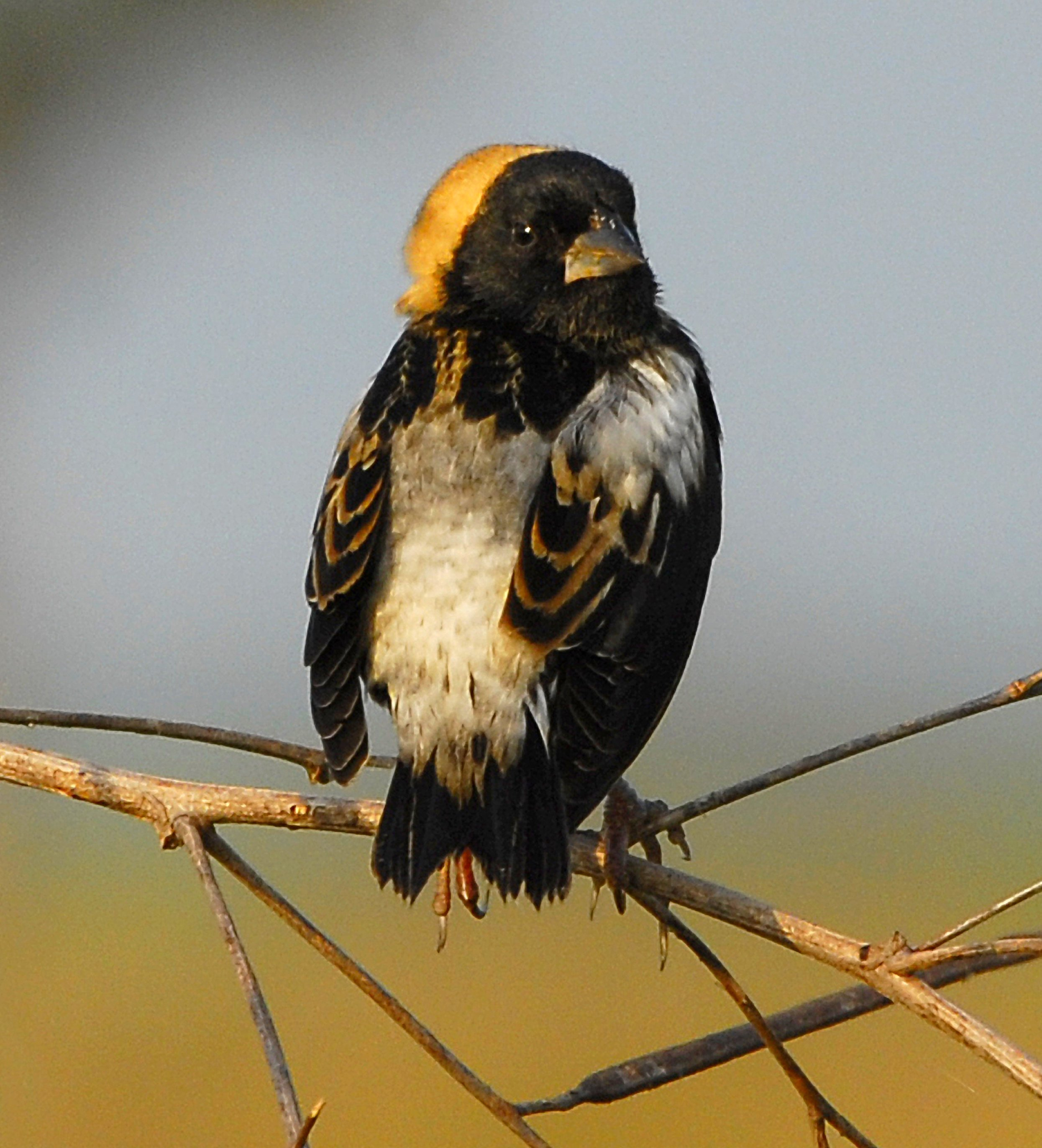 Bobolink at Lake Woodruff